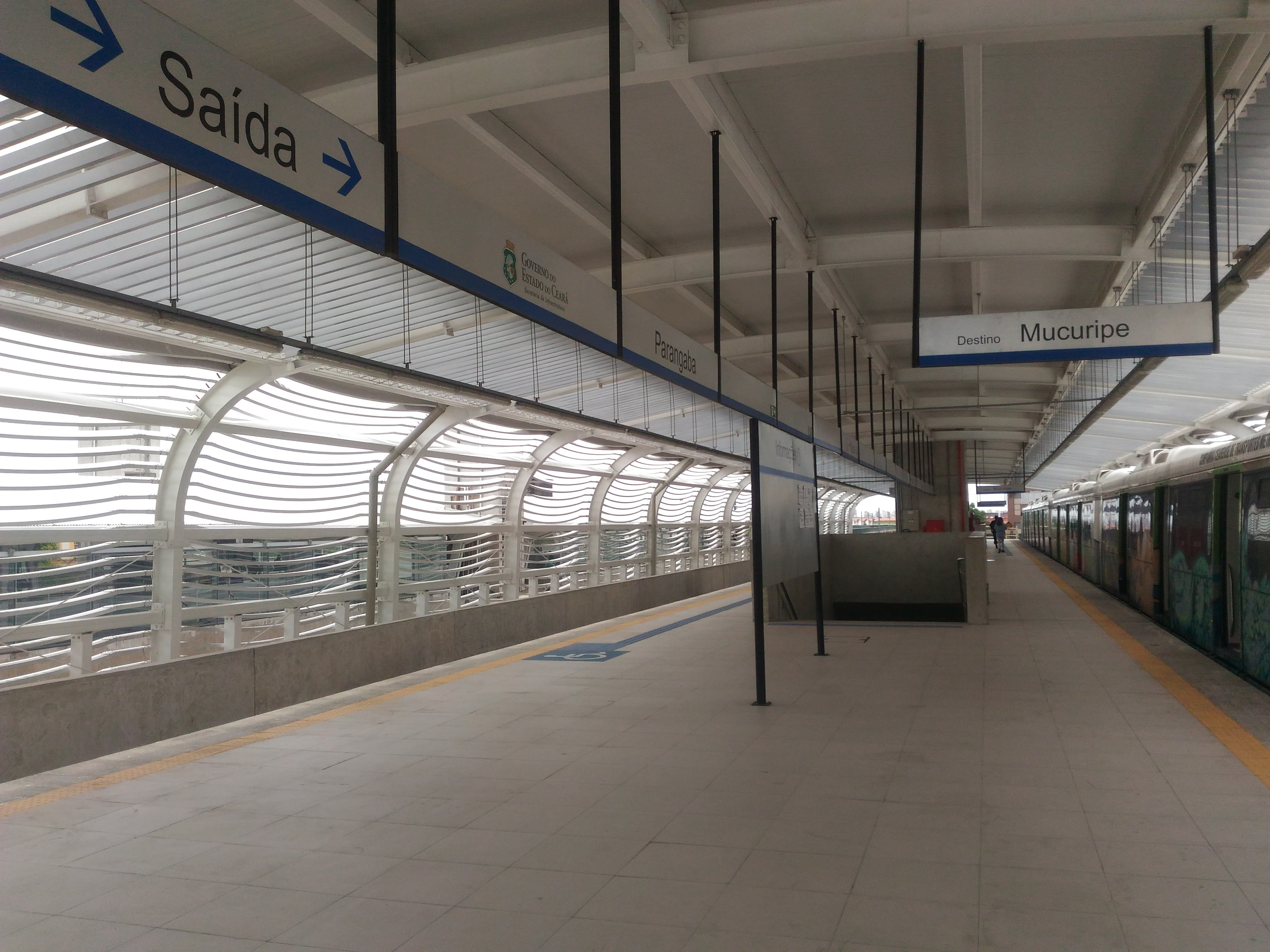 Plataforma destinada ao VLT na estação Parangaba.